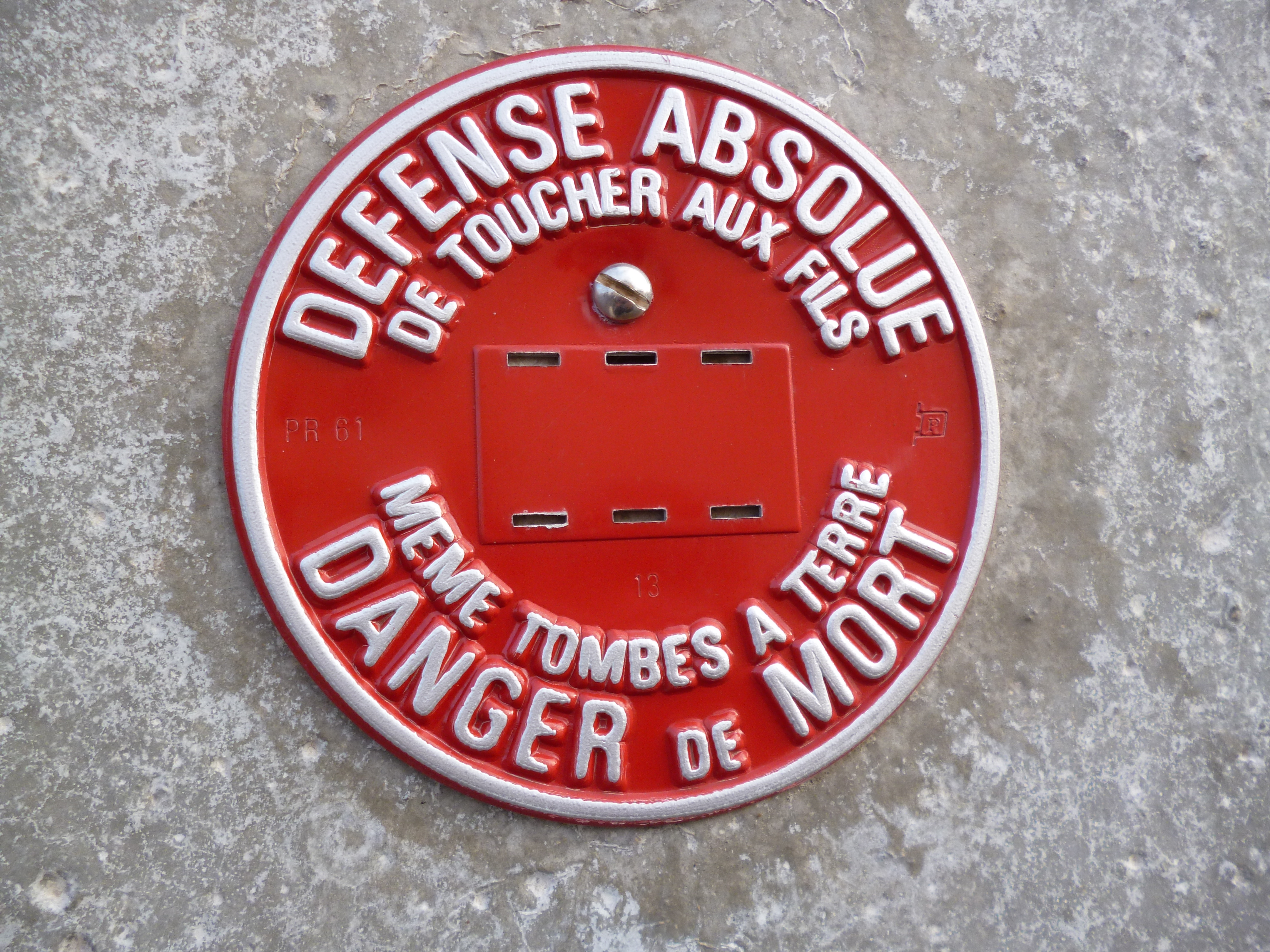 Message d'avertissement sur un poteau électrique, à Ansauvillers (Oise).